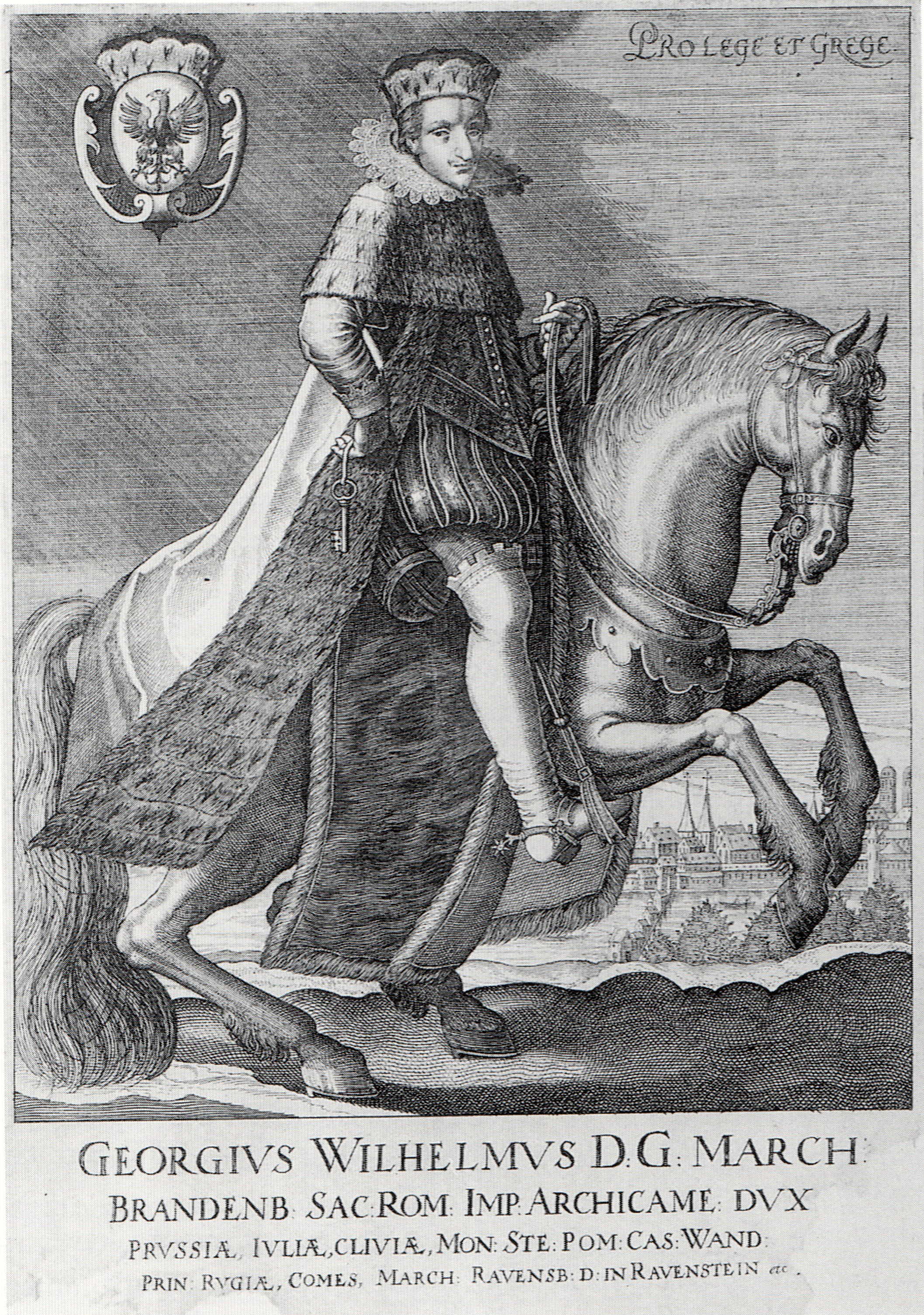 Kupferstich von Kurfürst Georg Wilhelm von Brandenburg.